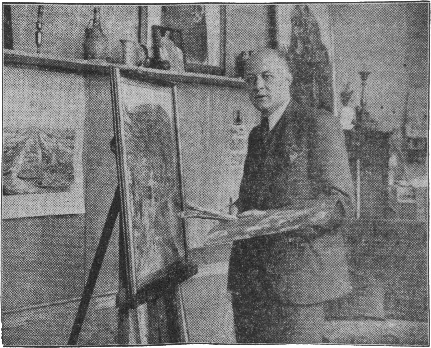 Paul Windhausen in een atelier in Maastricht. Uit: Limburger Koerier, 25 mei 1935, 90e jaargang, nr. 122, [p. 9].